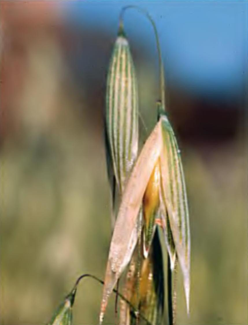 Espigueta de civada.